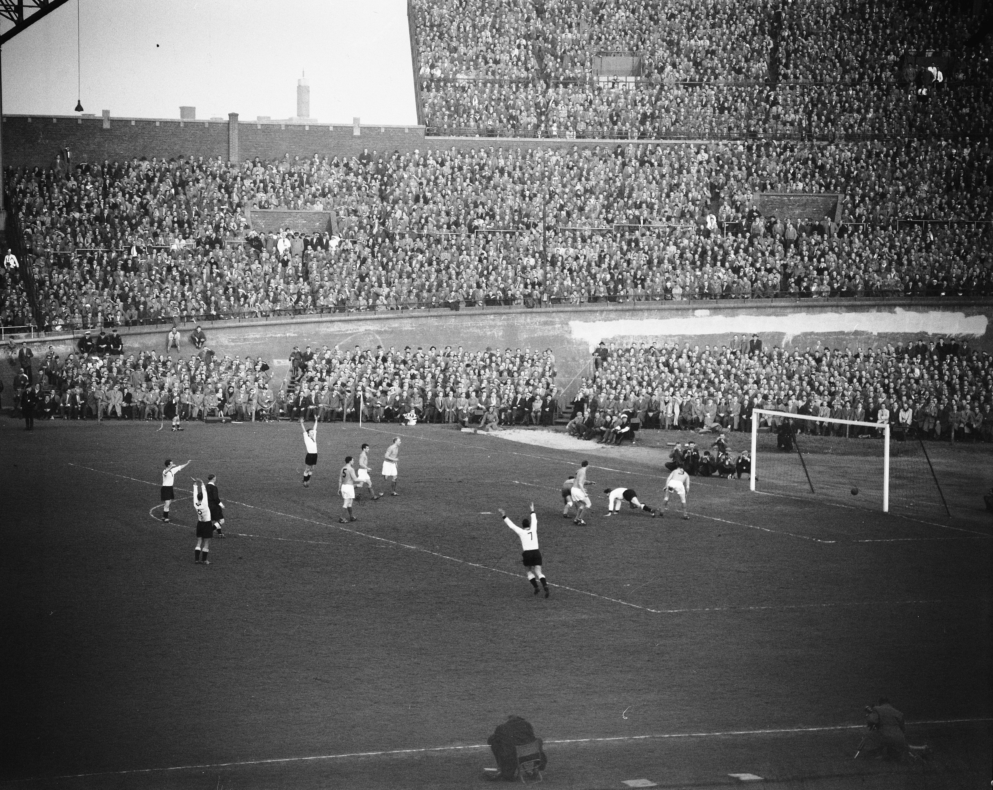 Collectie / Archief : Fotocollectie Anefo Reportage / Serie : [ onbekend ] Beschrijving : Voetbal Nederland tegen Duitsland in Olympisch Stadion Amsterdam. Tweede Duitse doelpunt Datum : 3 april 1957 Locatie : Amsterdam, Noord-Holland Trefwoorden : doelpunten, sport, voetbal Instellingsnaam : Olympisch Stadion Fotograaf : Bilsen, Joop van / Anefo Auteursrechthebbende : Nationaal Archief Materiaalsoort : Negatief (zwart/wit) Nummer archiefinventaris : bekijk toegang 2.24.01.04 Bestanddeelnummer : 908-4680